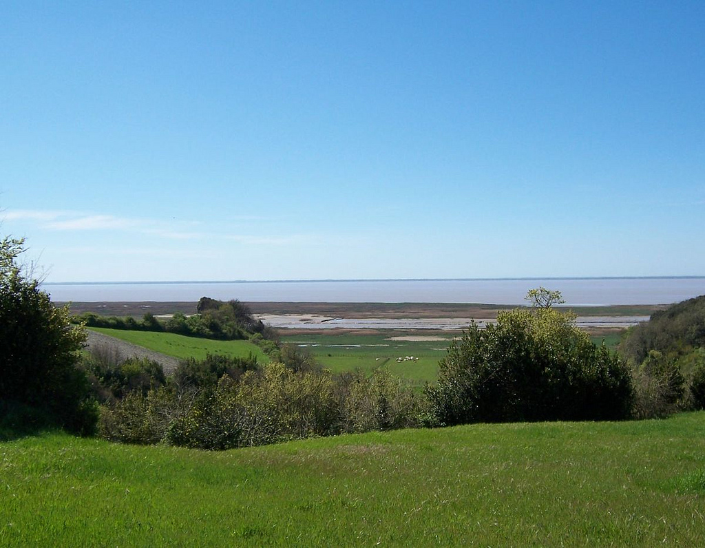 L'estuaire de la Gironde pres du petit village de St Bonnet